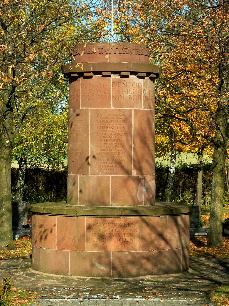 War Memorial - Krieger-/Kriegsopferdenkmal - Mémorial de guerre